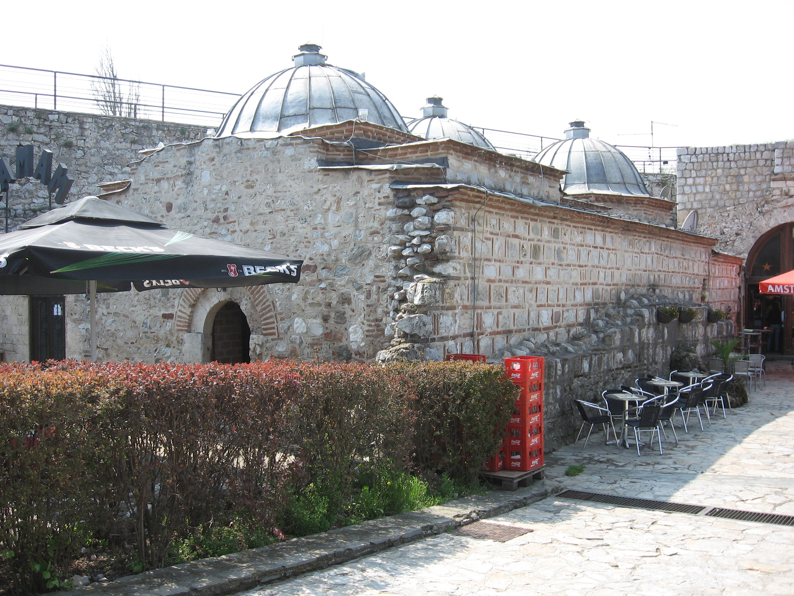 Hamam u Nisu. Snimljeno 10. aprila 2010.